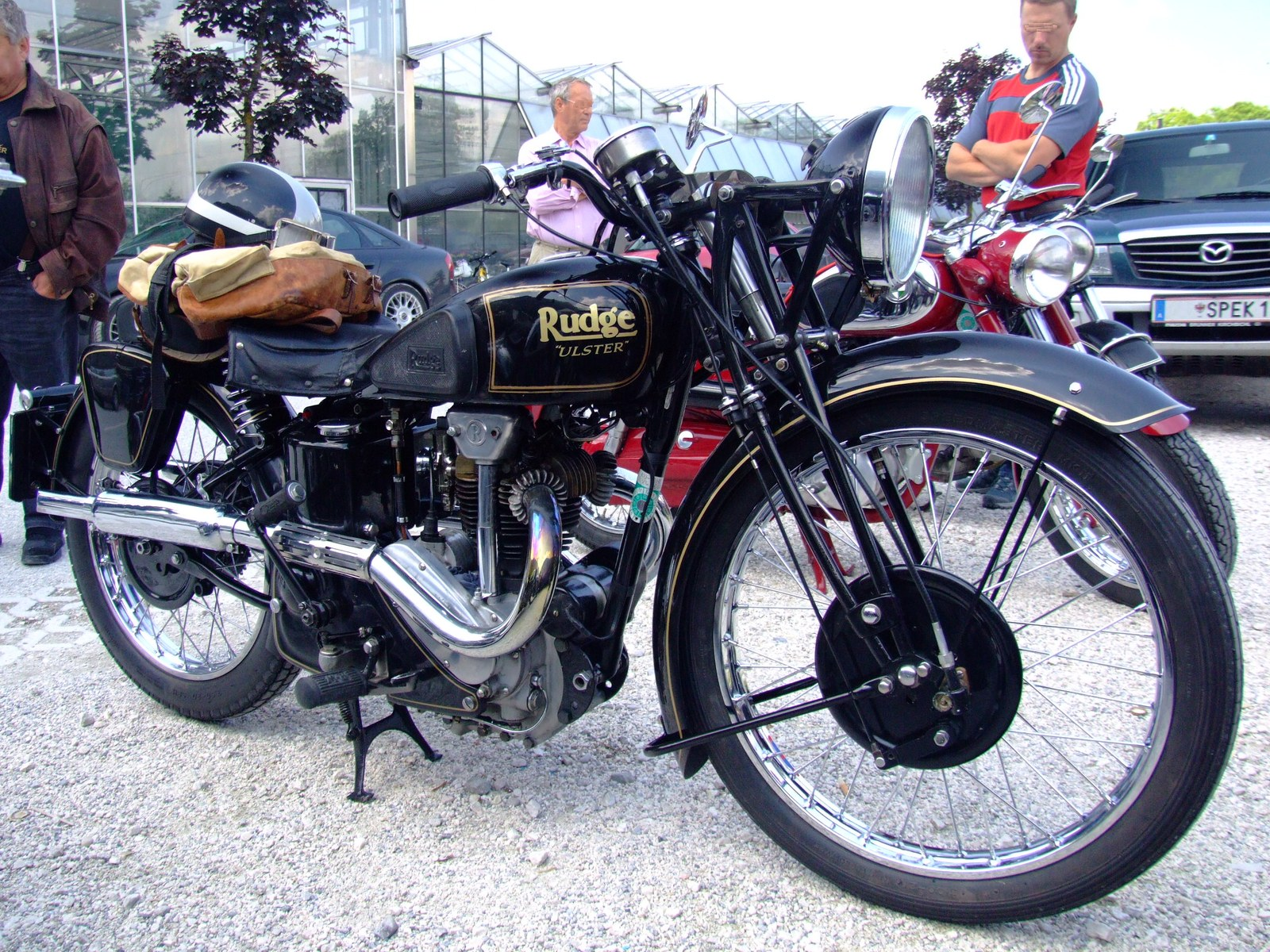 Quelle: selbst fotografiert, 06/2007 Fotograf: Späth Chr.